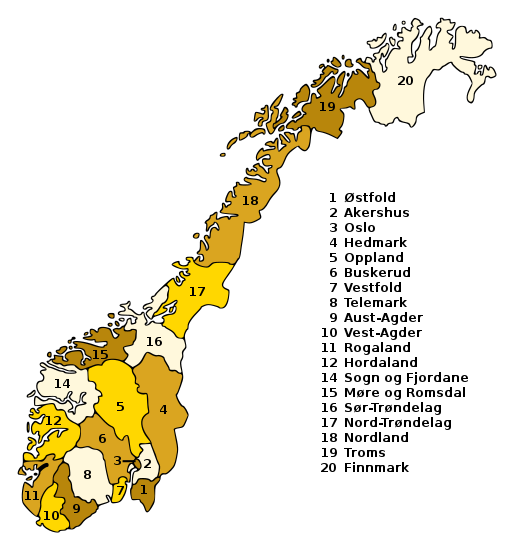 Norge har totalt 19 valgkretser